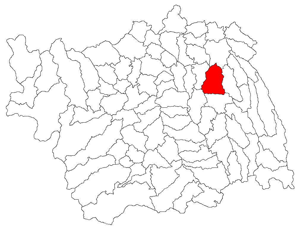 Categorie:Hărţi ale judeţului Bacău